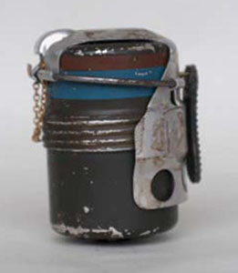 bomba a mano SRCM, italian army